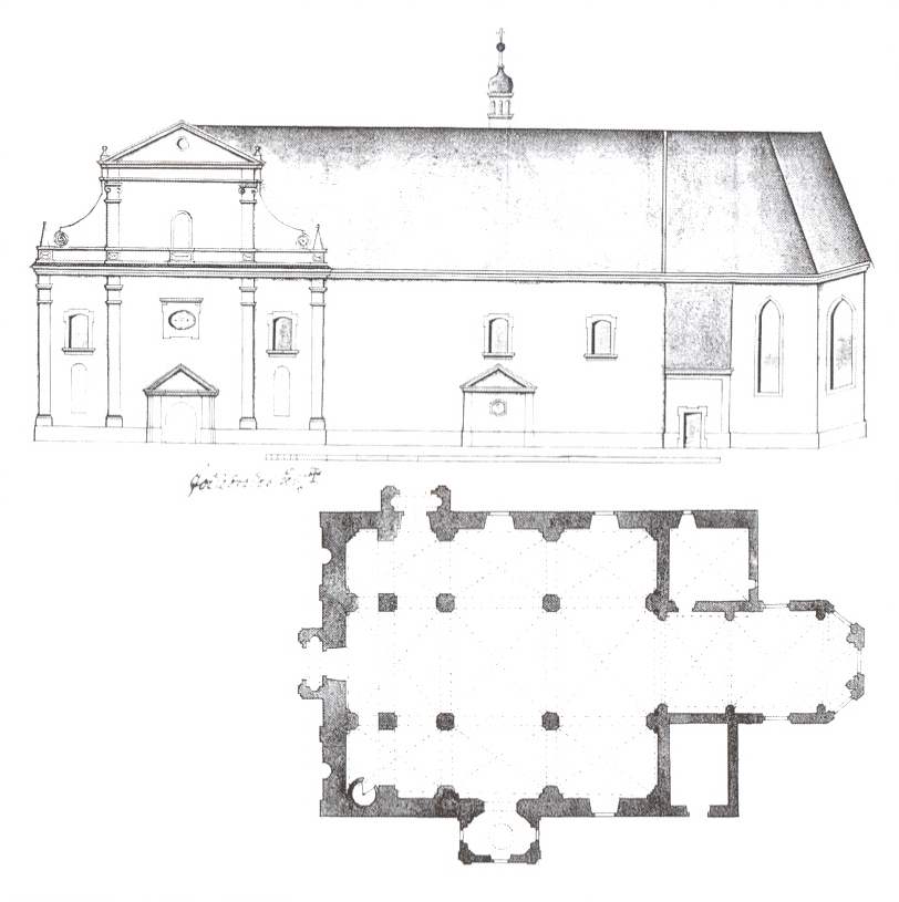 Kostel Povýšení svatého Kříže v Poděbradech – plán z poloviny 18. století. Originál je uložen ve fondu Fundační komise v SÚA v Praze.